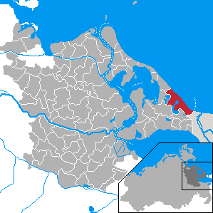 Heringsdorf, Landkreis Ostvorpommern, Mecklenburg-Vorpommern